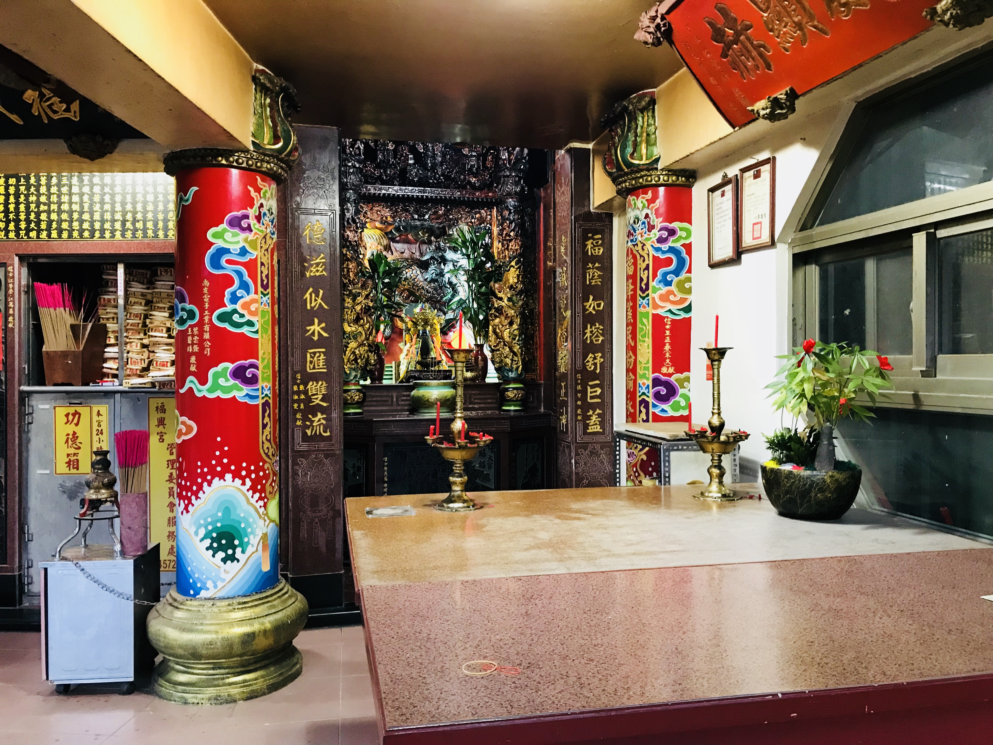 暖暖雙生土地公廟中的福德宮